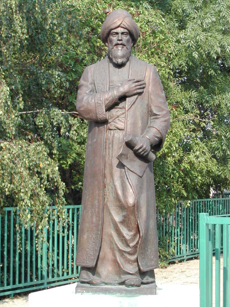 Personal picture